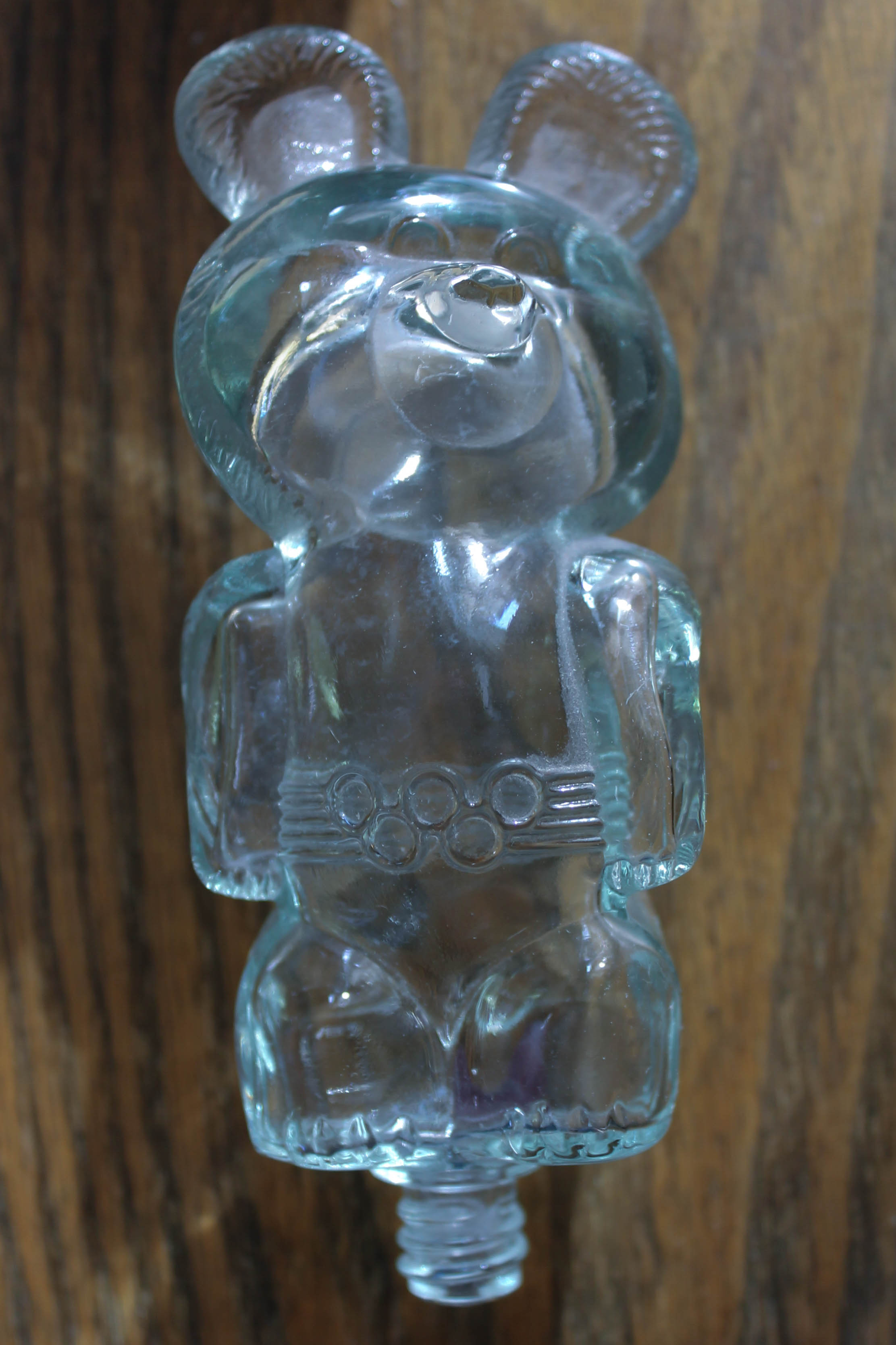 Флакон для духов "Олимпийский мишка" производства Торковического стекольного завода.